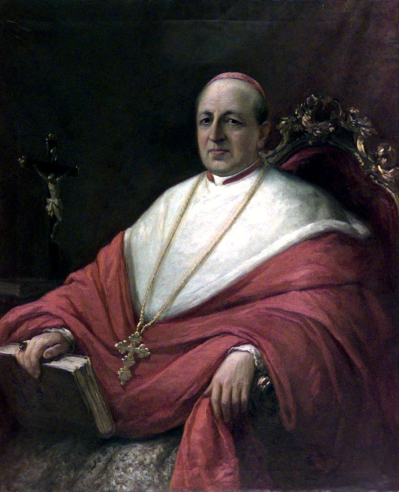 Spinelli A. A. sec. XIX-XX, Ritratto del cardinale Agliardi